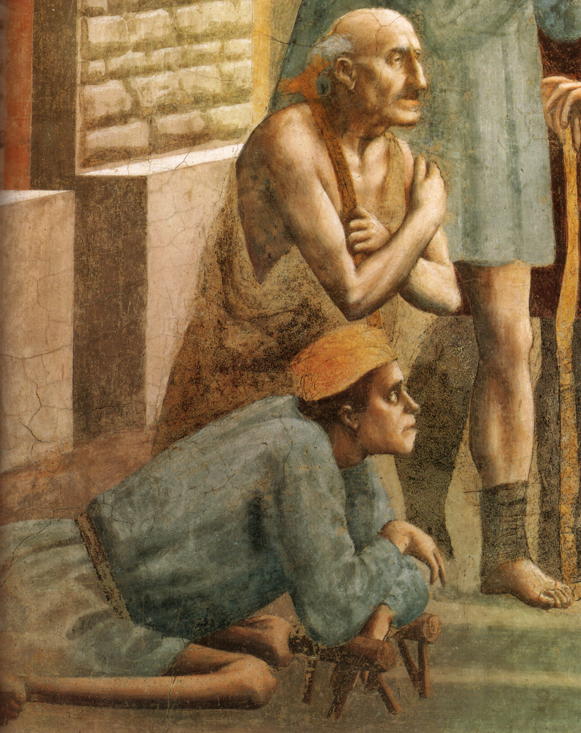 detail(restaurato)